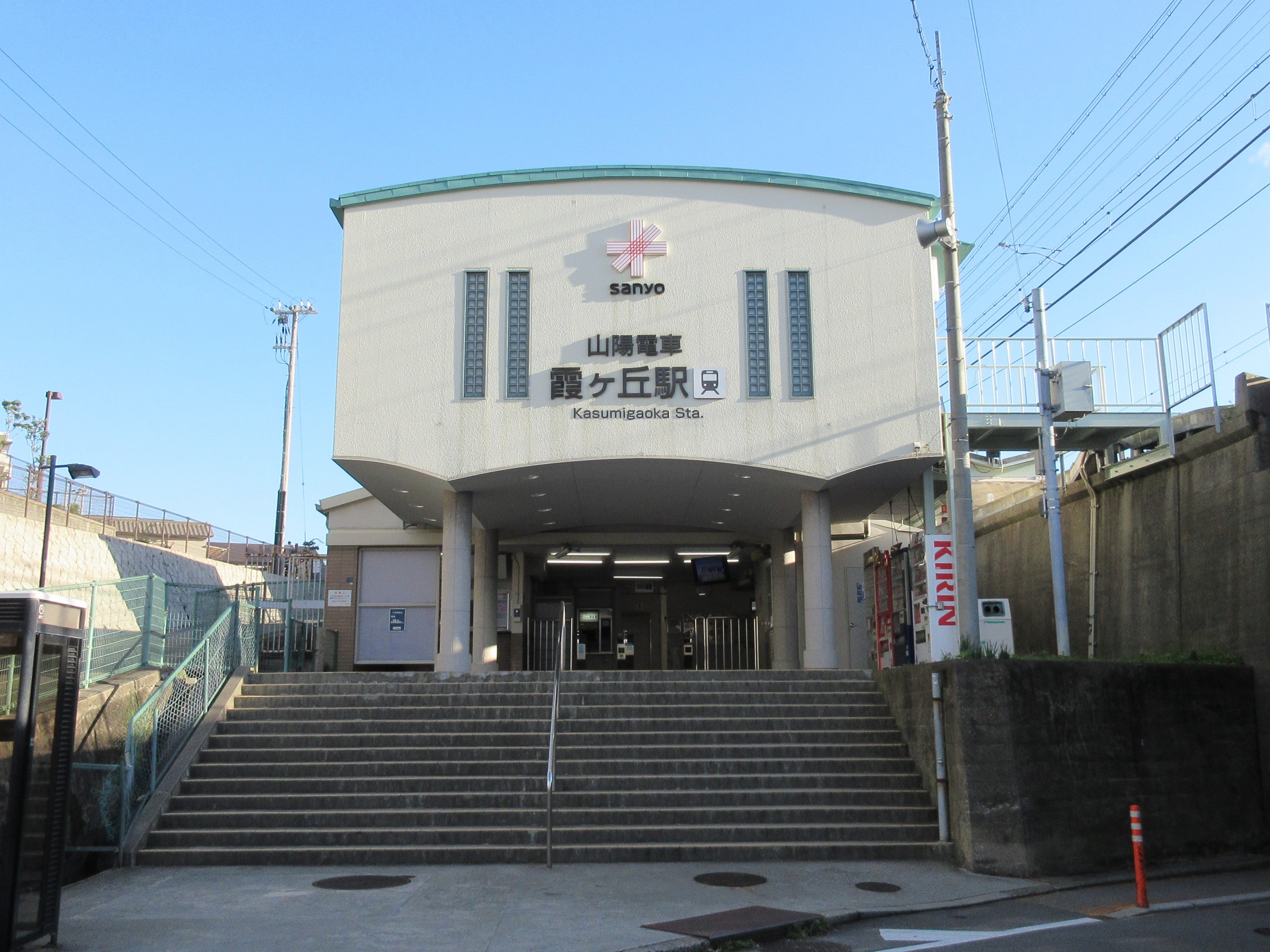 山陽電鉄霞ヶ丘駅